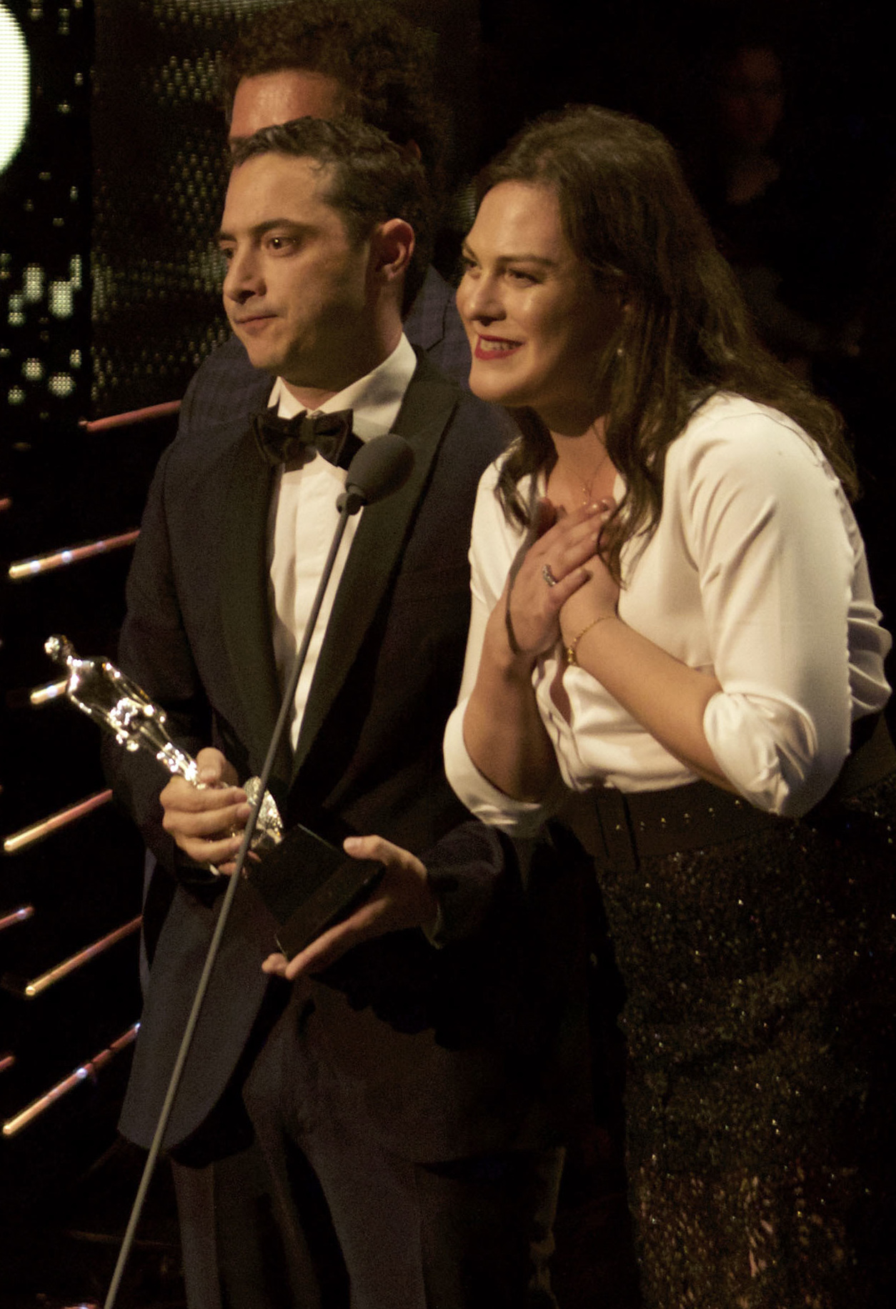 Mejor Película Iberoamericana lo recibe Una Mujer Fantástica, Sebastián Lelio